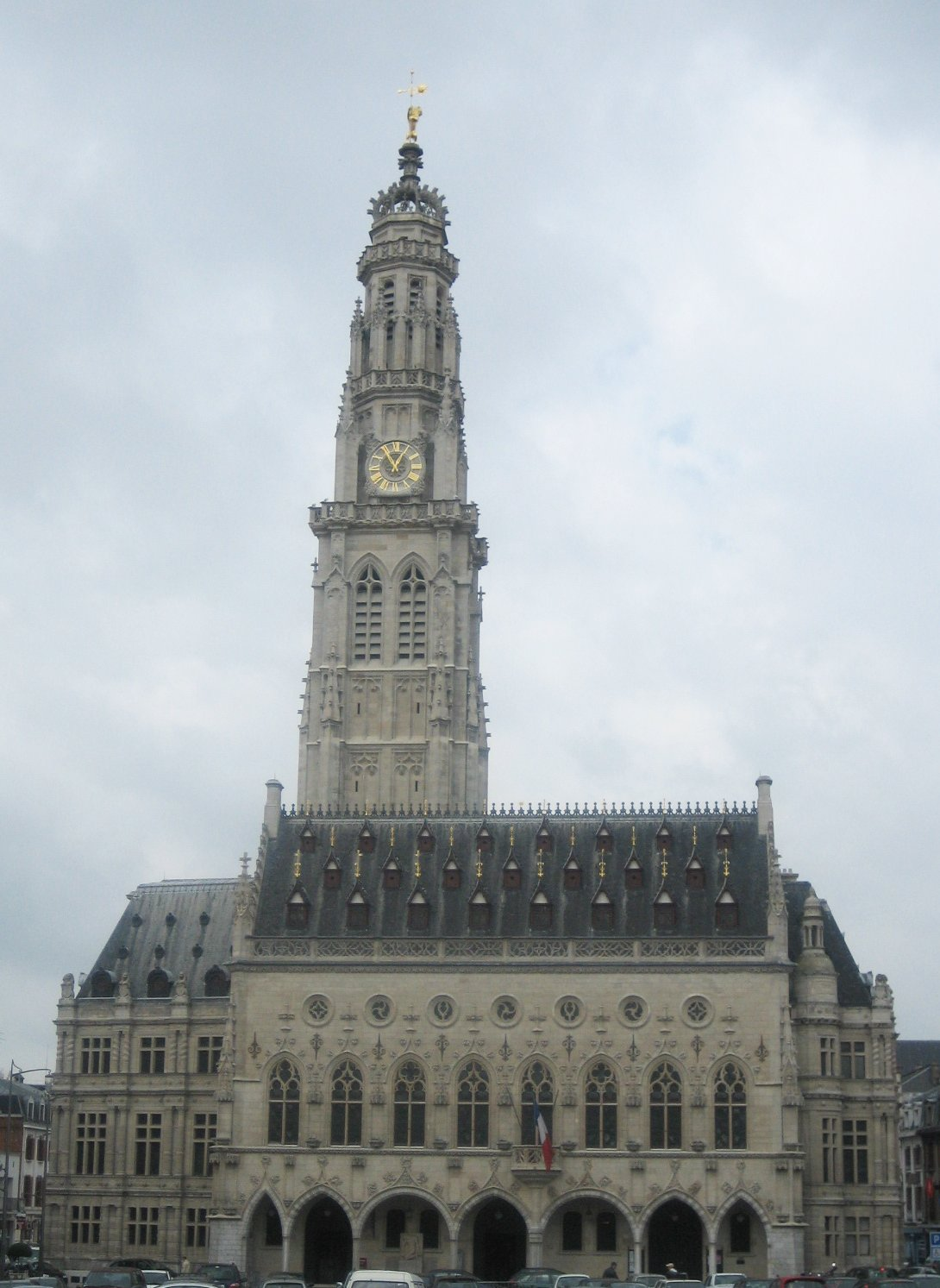 D'Stadhaus vun Arras, mat sengem Beffroid. 30. Abrëll 2006.